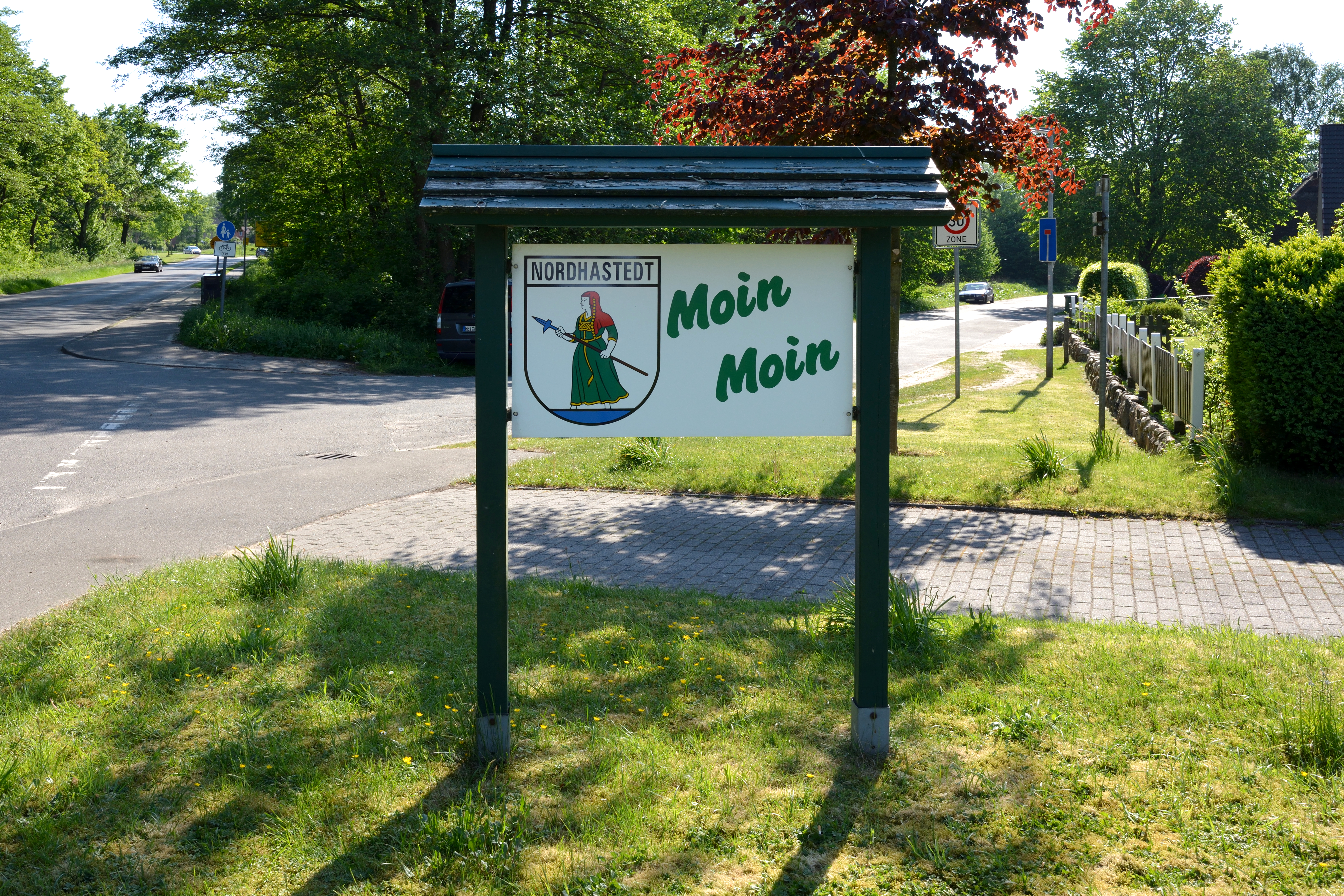 Schild am Ortseingang von Nordhastedt